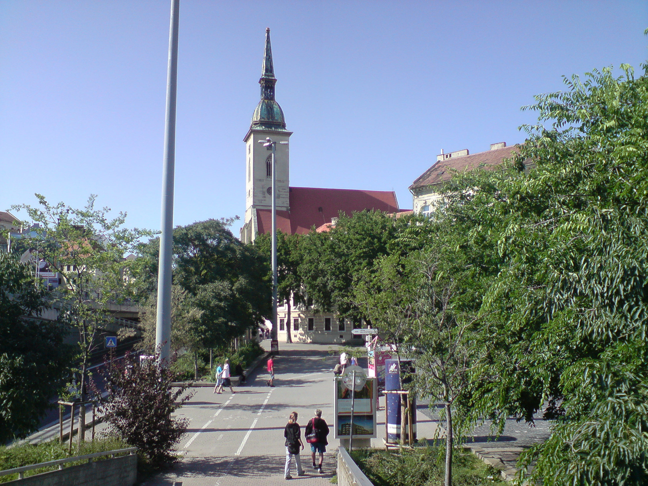 Katedrála svätého Martina